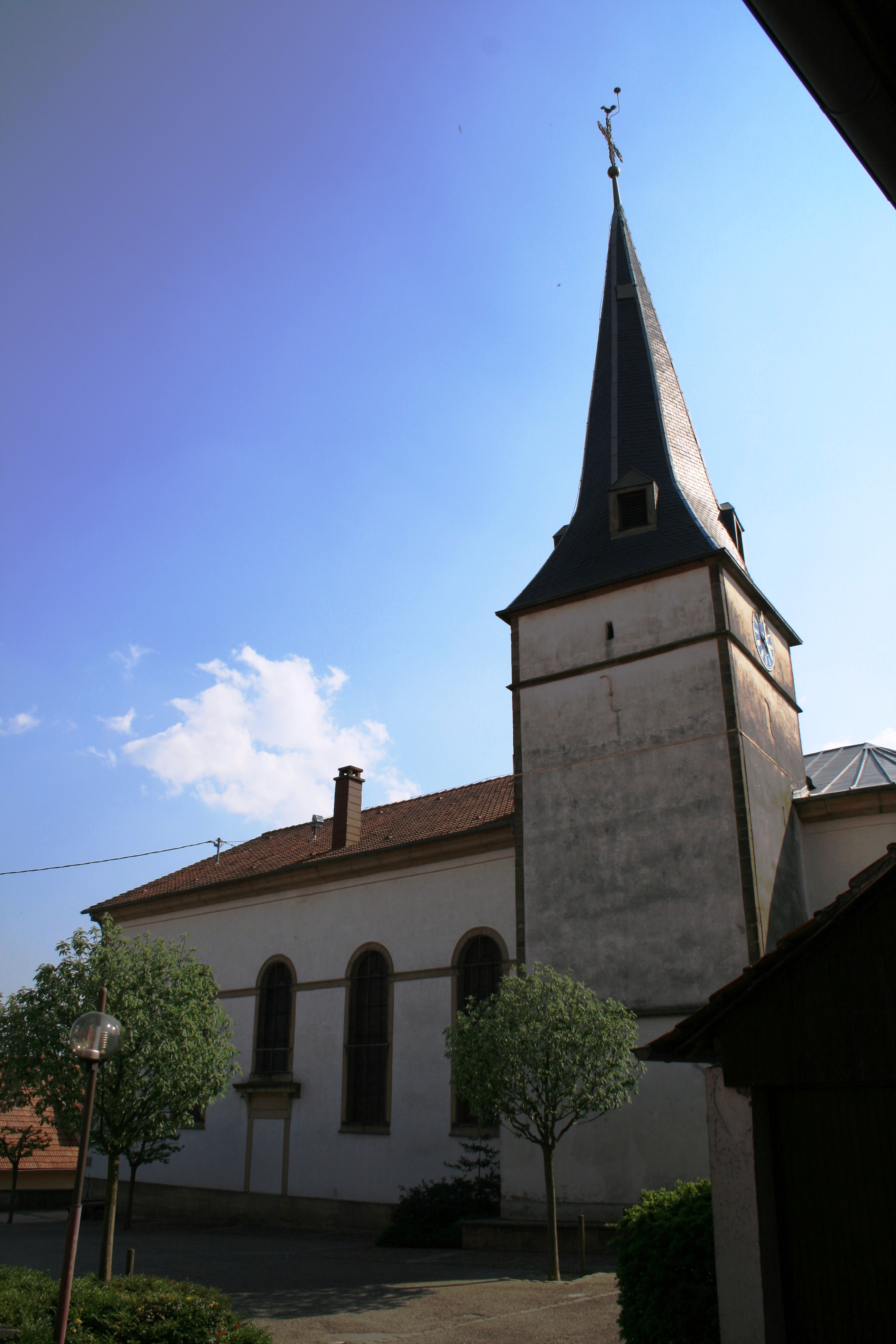 Lampertsloch, Alsace